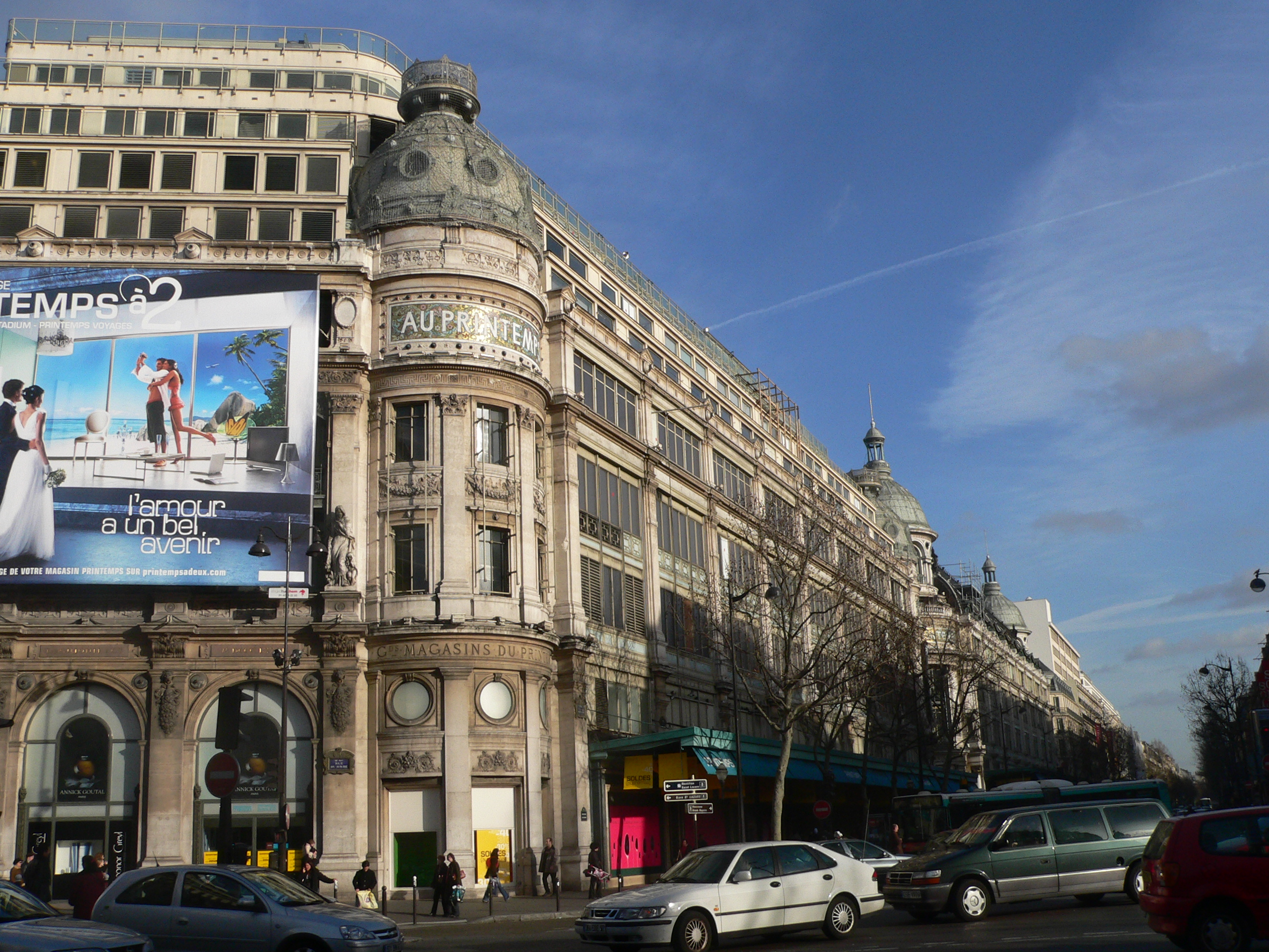 Les grands magasins du Printemps sur les Grands Boulevards, à Paris